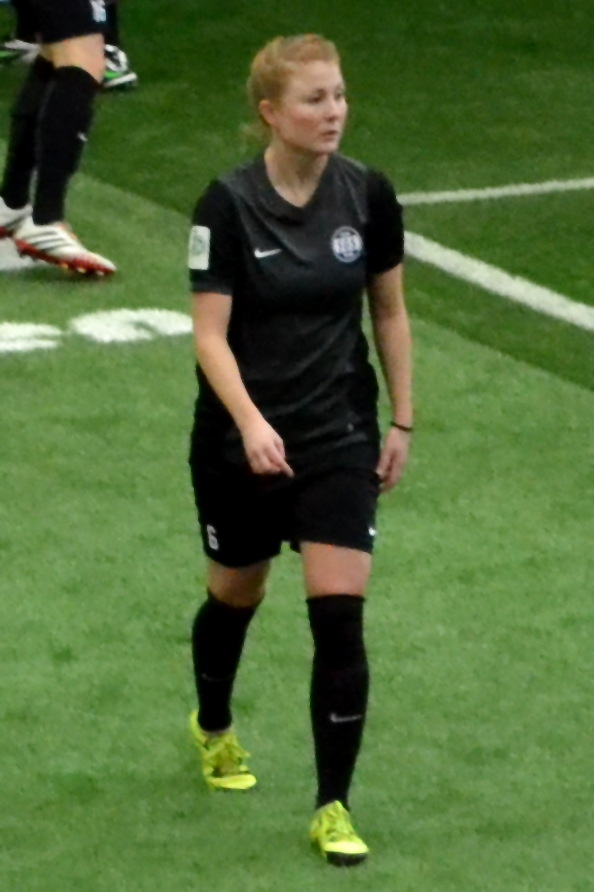 Vanessa Martini (SGS Essen) beim SAP Frauen-FußballCup 2016